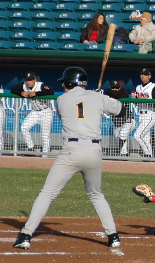 Mark Reynolds